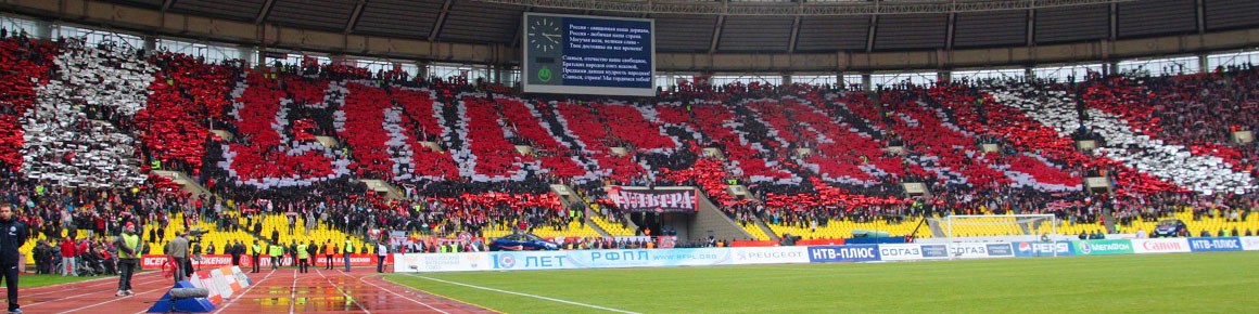 Перфоманс "Спартак" на матче с "Зенитом". 2011 год